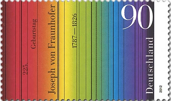 90 Cent Briefmarke der Deutschen Post zum 225. Geburtstag Joseph von Fraunhofers